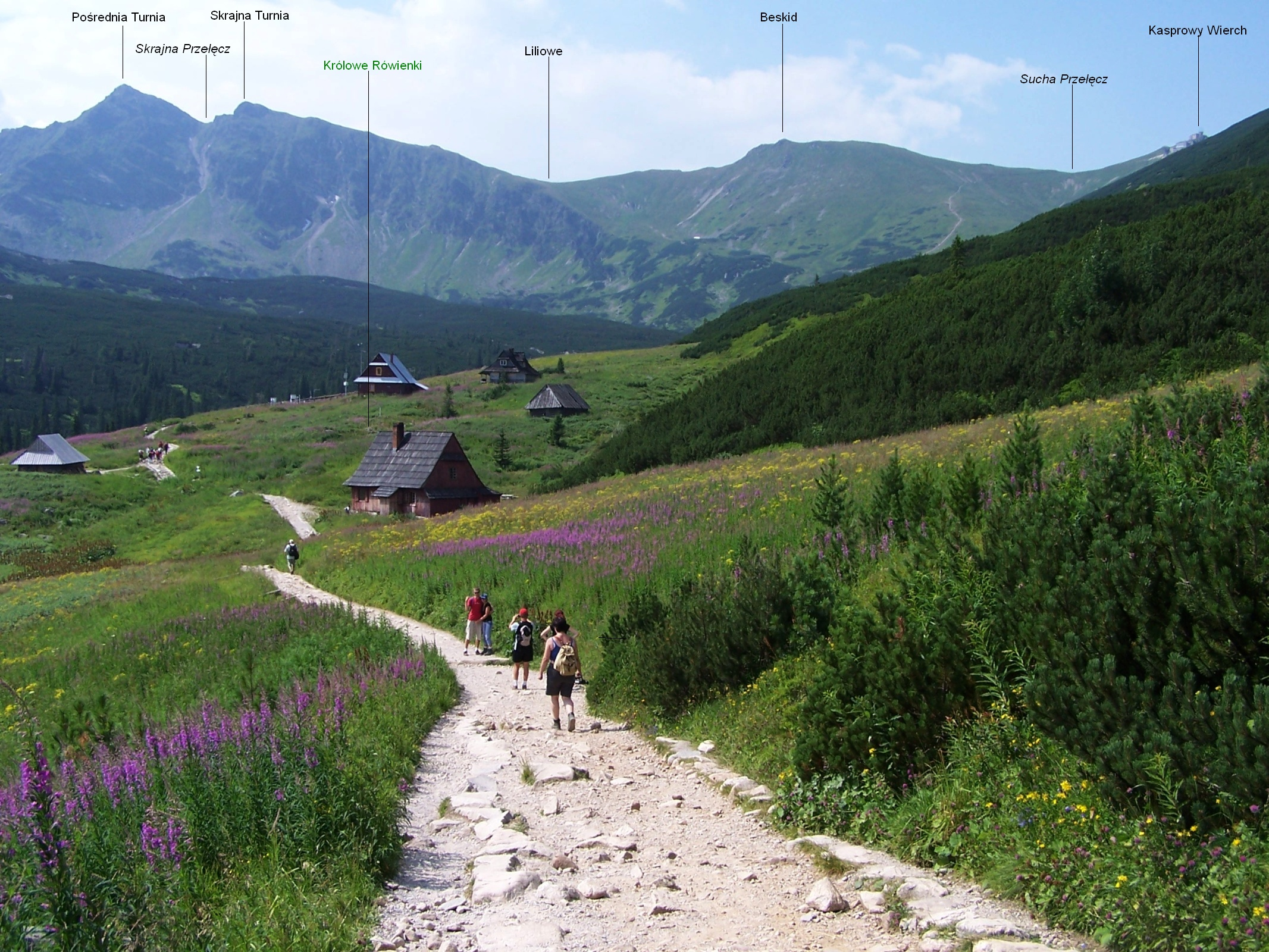 Dolina Gąsienicowa i grań główna